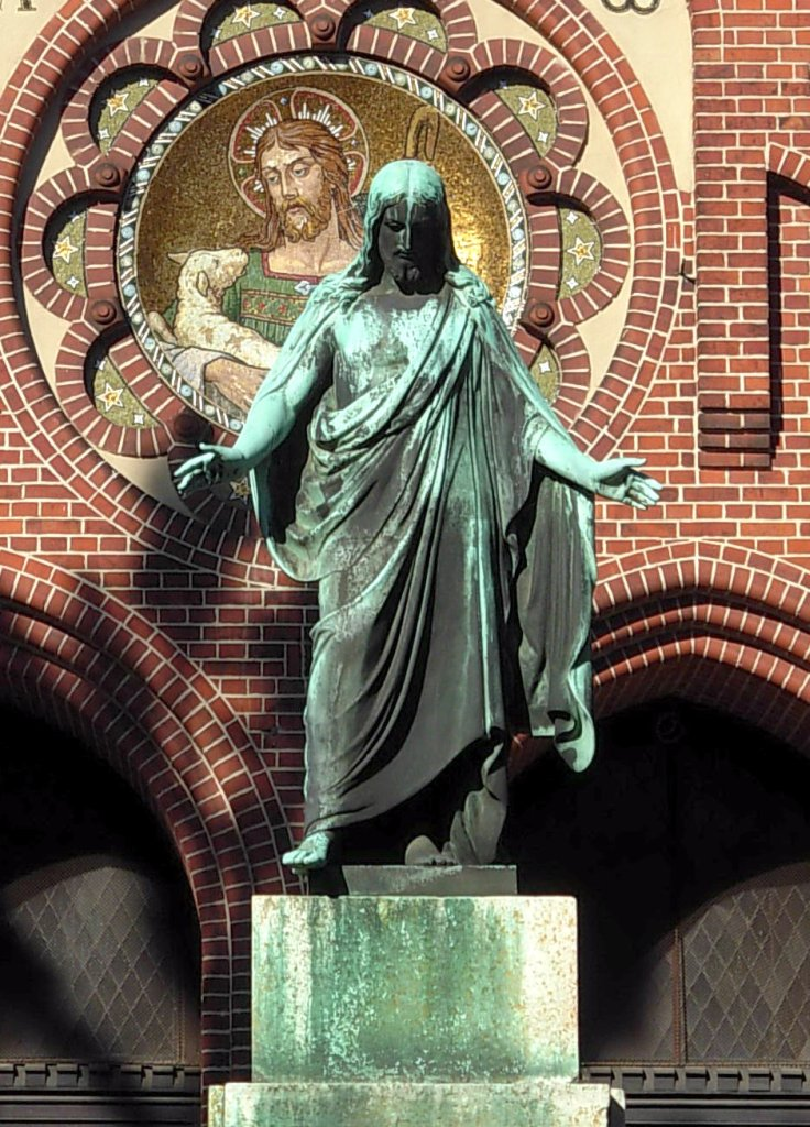 Pomnik Chrystusa Zbawiciela przed kościołem ewangelicko-augsburskim w Bydgoszczy